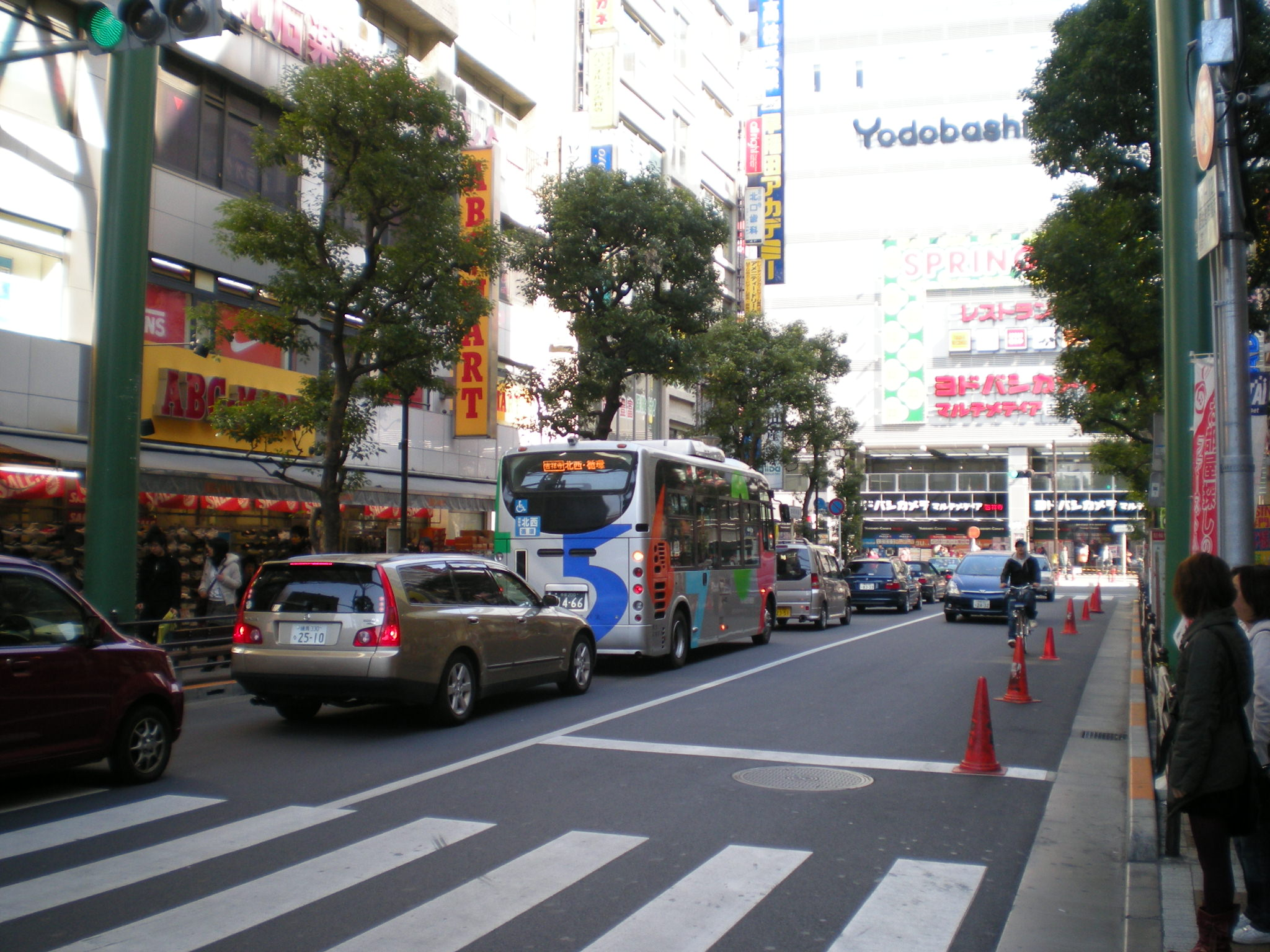 Kichijoji(2008/03/09)